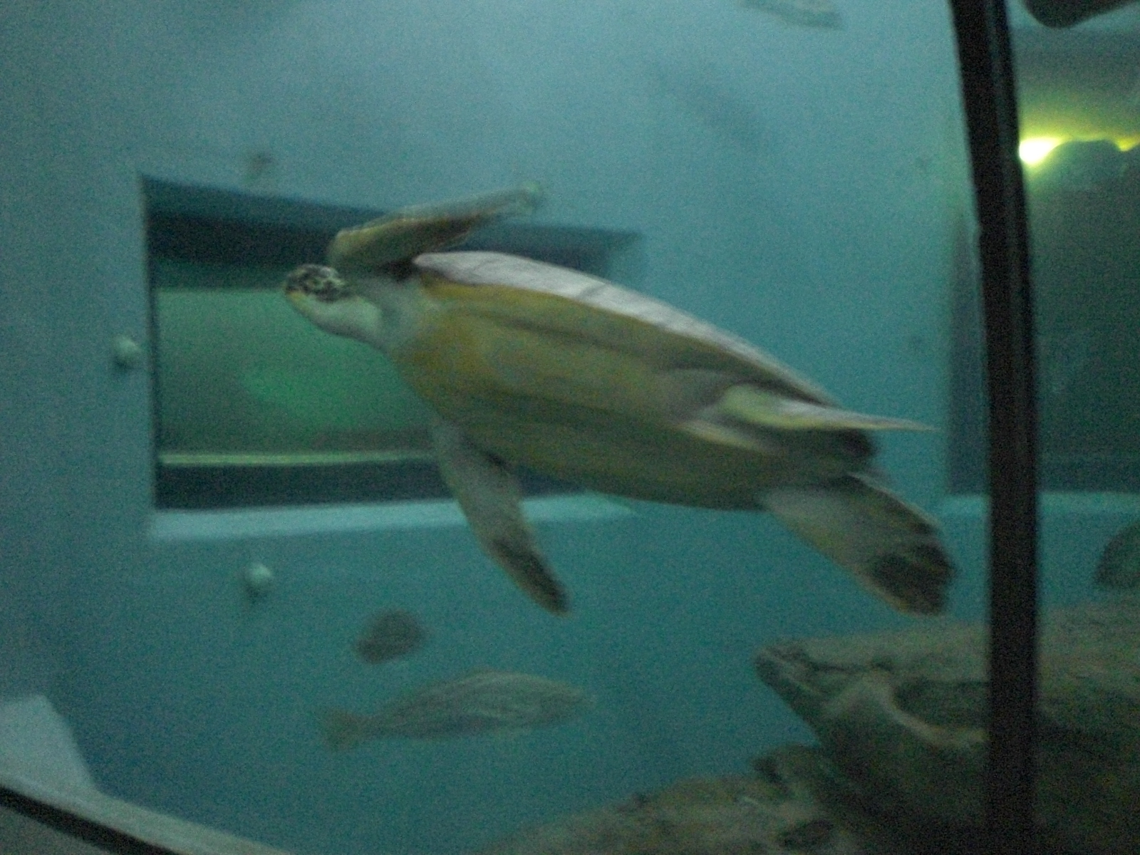 Nationales Maritimes Aquarium von Namibia